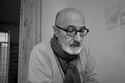 Portrait de Frédéric Stehr en noir et blanc